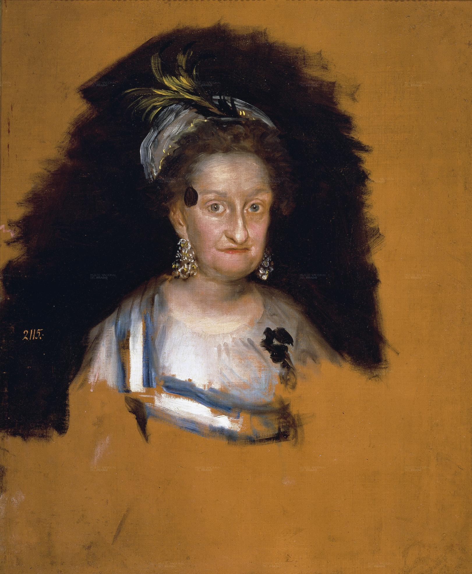 Boceto preparatorio para La familia de Carlos IV